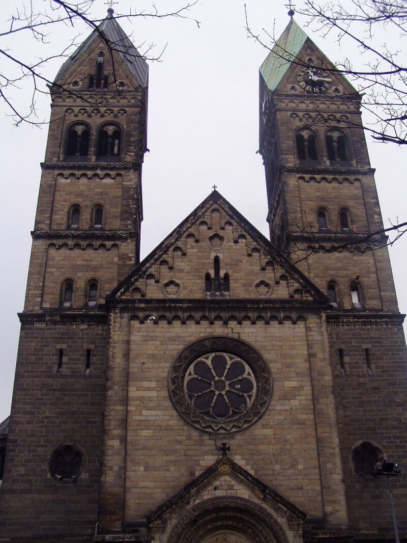 Bytom - kościół Świętego Jacka